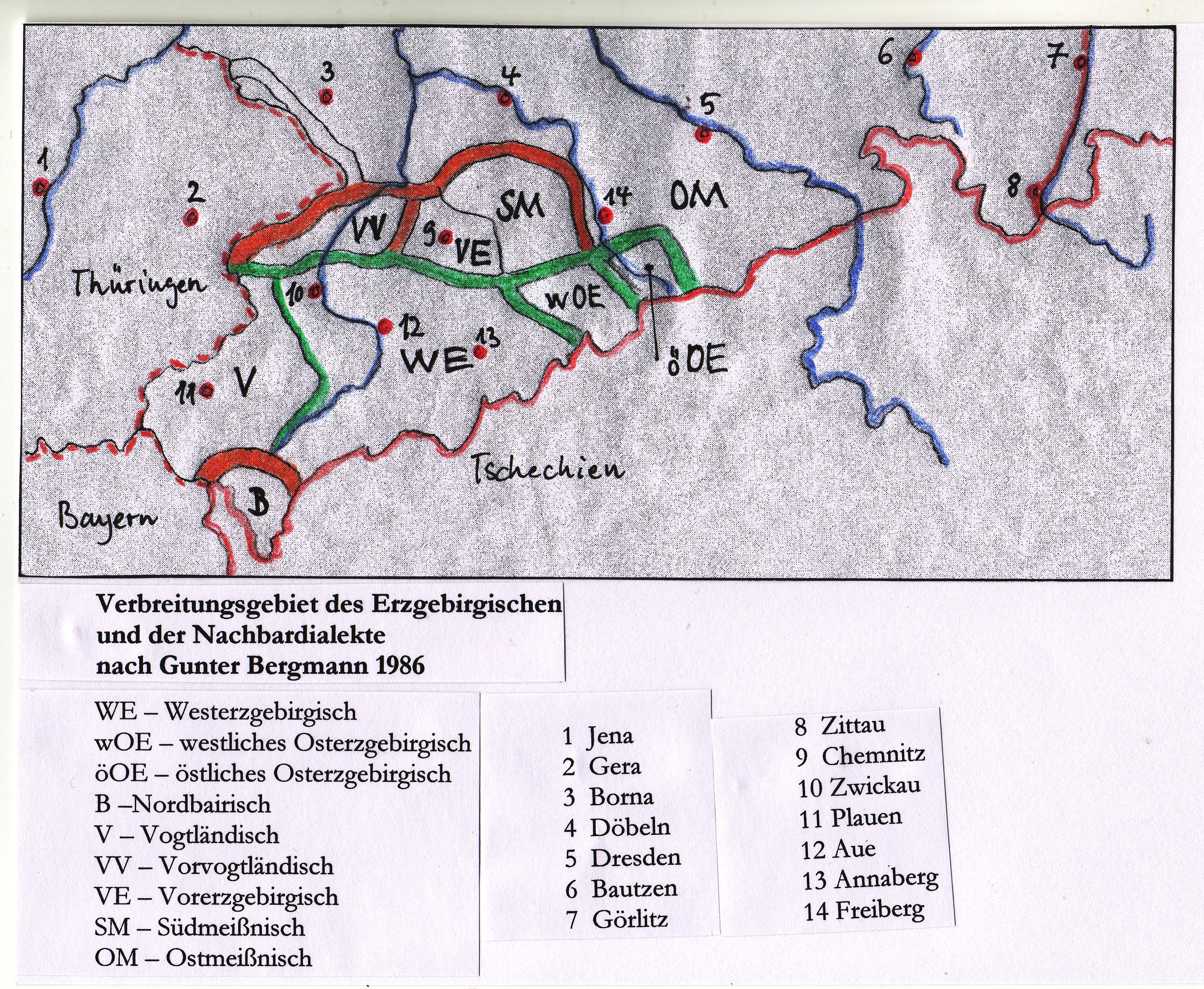 Erzgebirgisch: Das Verbreitungsgebiet des erzgebirgischen Dialekts und der Nachbardialekte in Sachsen nach der Darstellung von Gunter Bergmann in „Kleines sächsisches Wörterbuch, VEB Bibliographisches Institut Leipzig, 1. Auflage 1986, abgezeichneter kolorierter Ausschnitt aus der Karte im Vorsatz